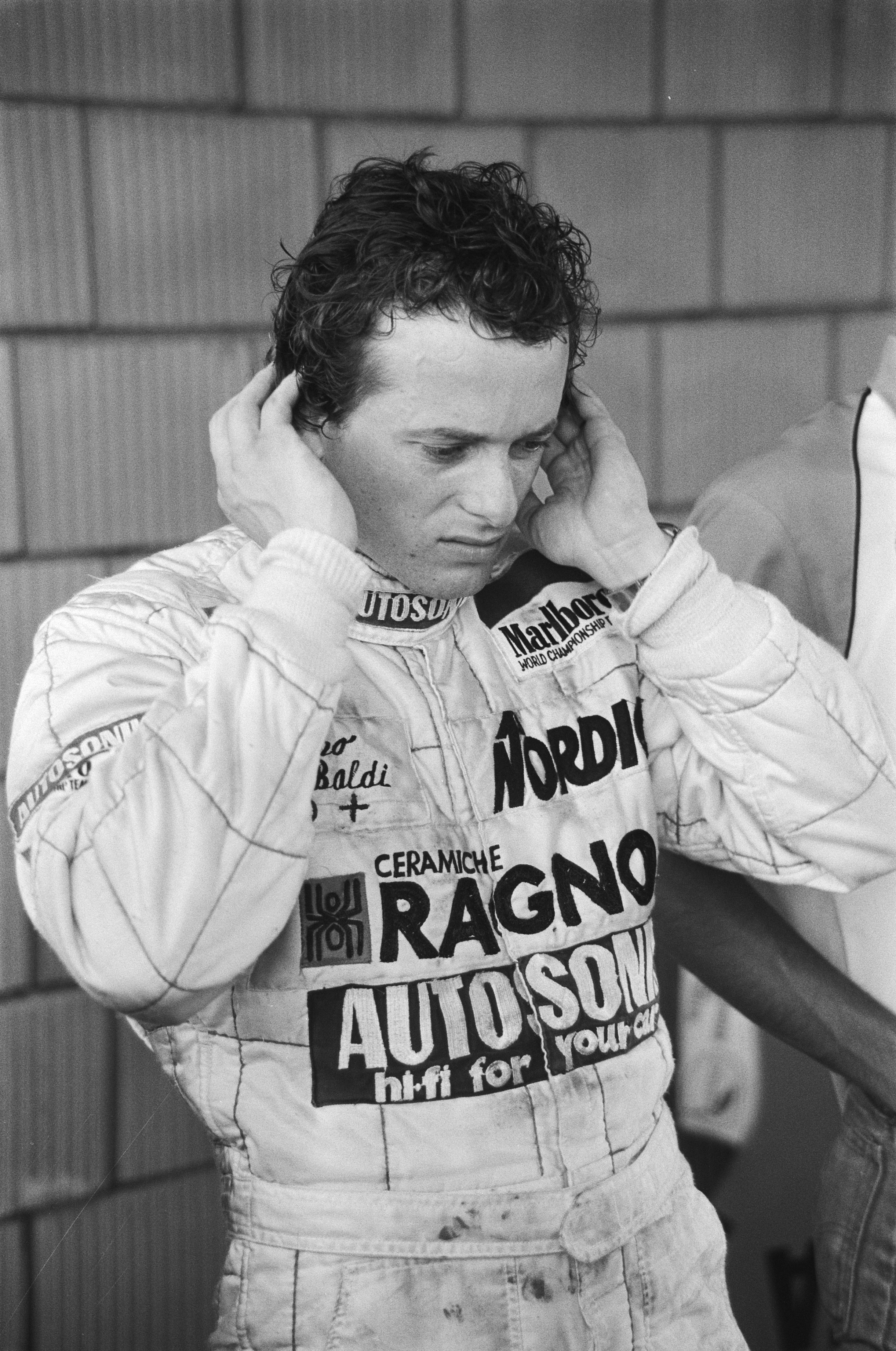 Mauro Baldi lors du Grand Prix des Pays-Bas 1982 à Zandvoort.